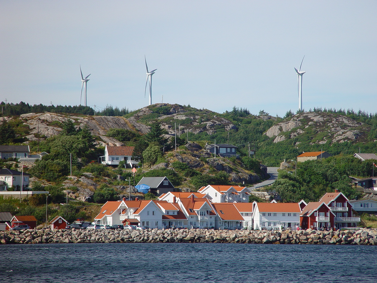 Lillehavn